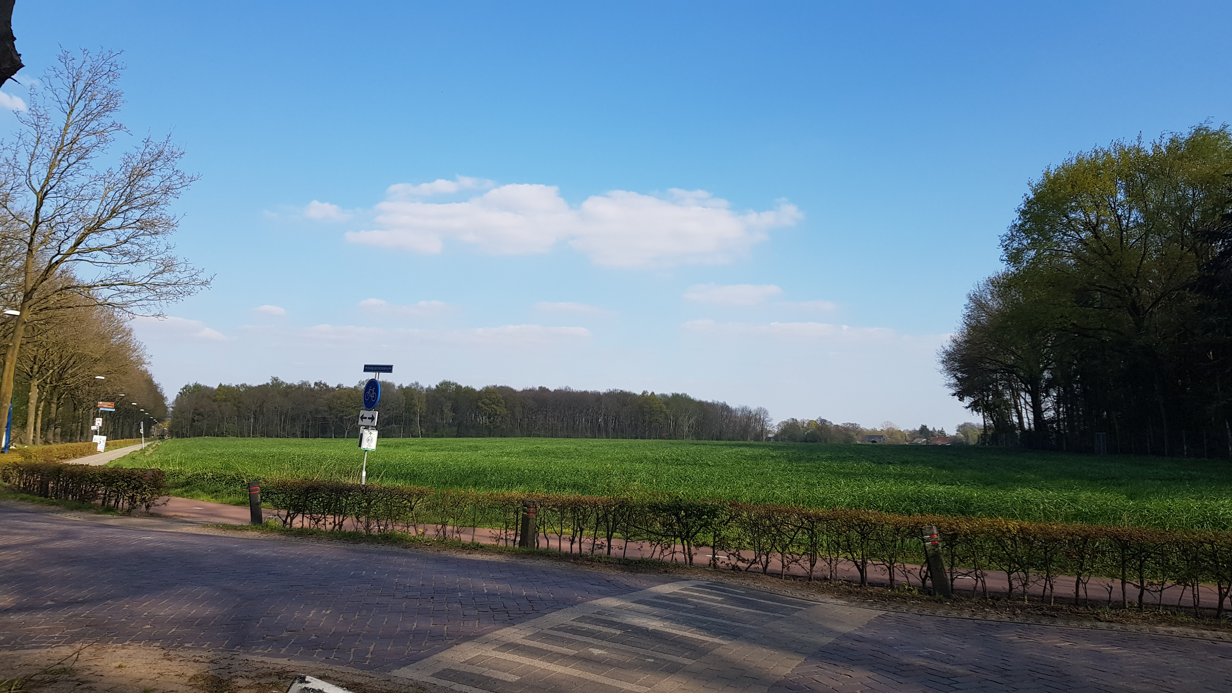 terrein van Romeinse villa van Hoogeloon, Nederland